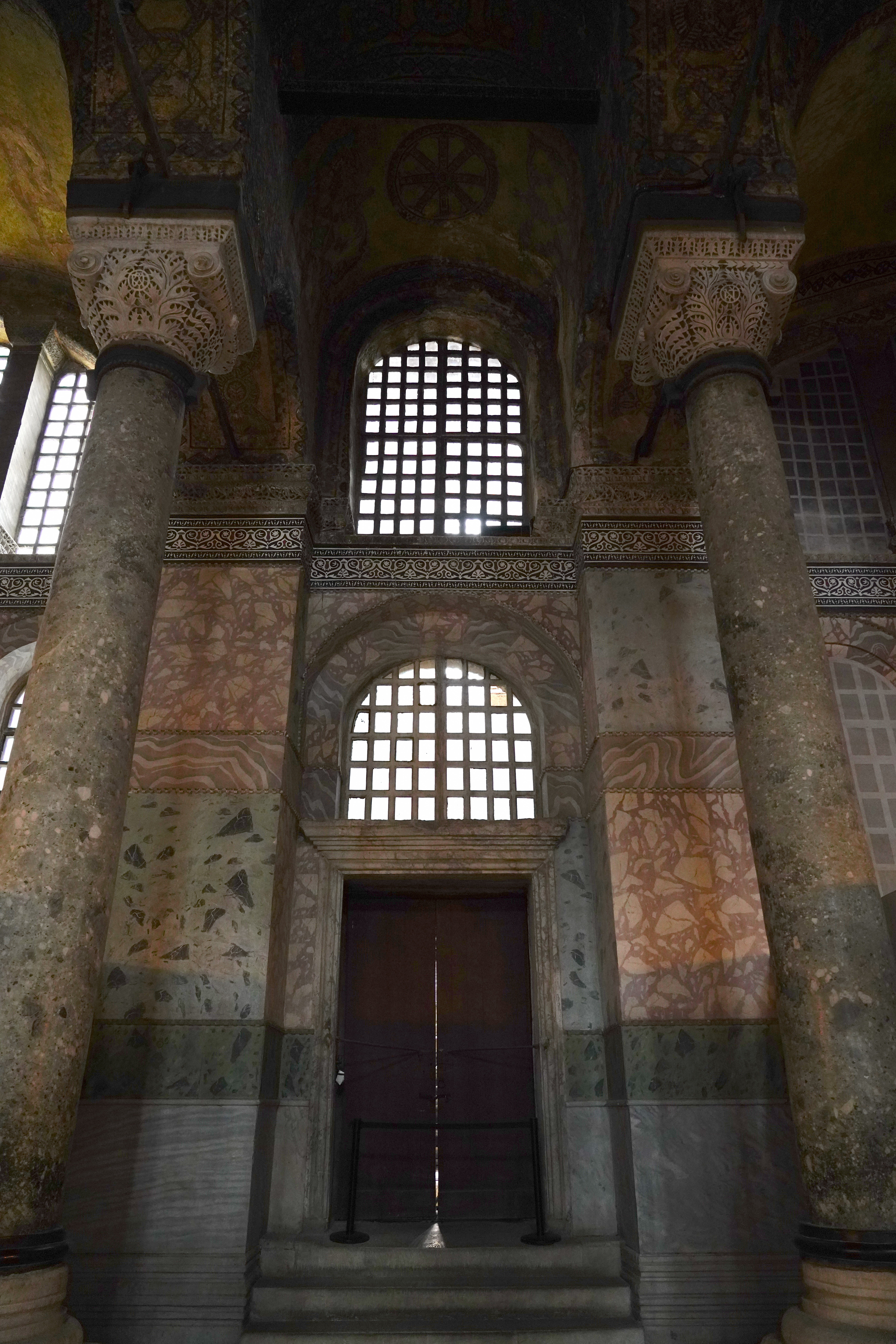 80114_HagiaSophia_7606